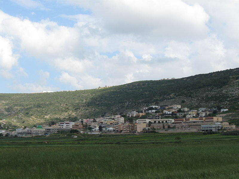 Ozeir עוזייר